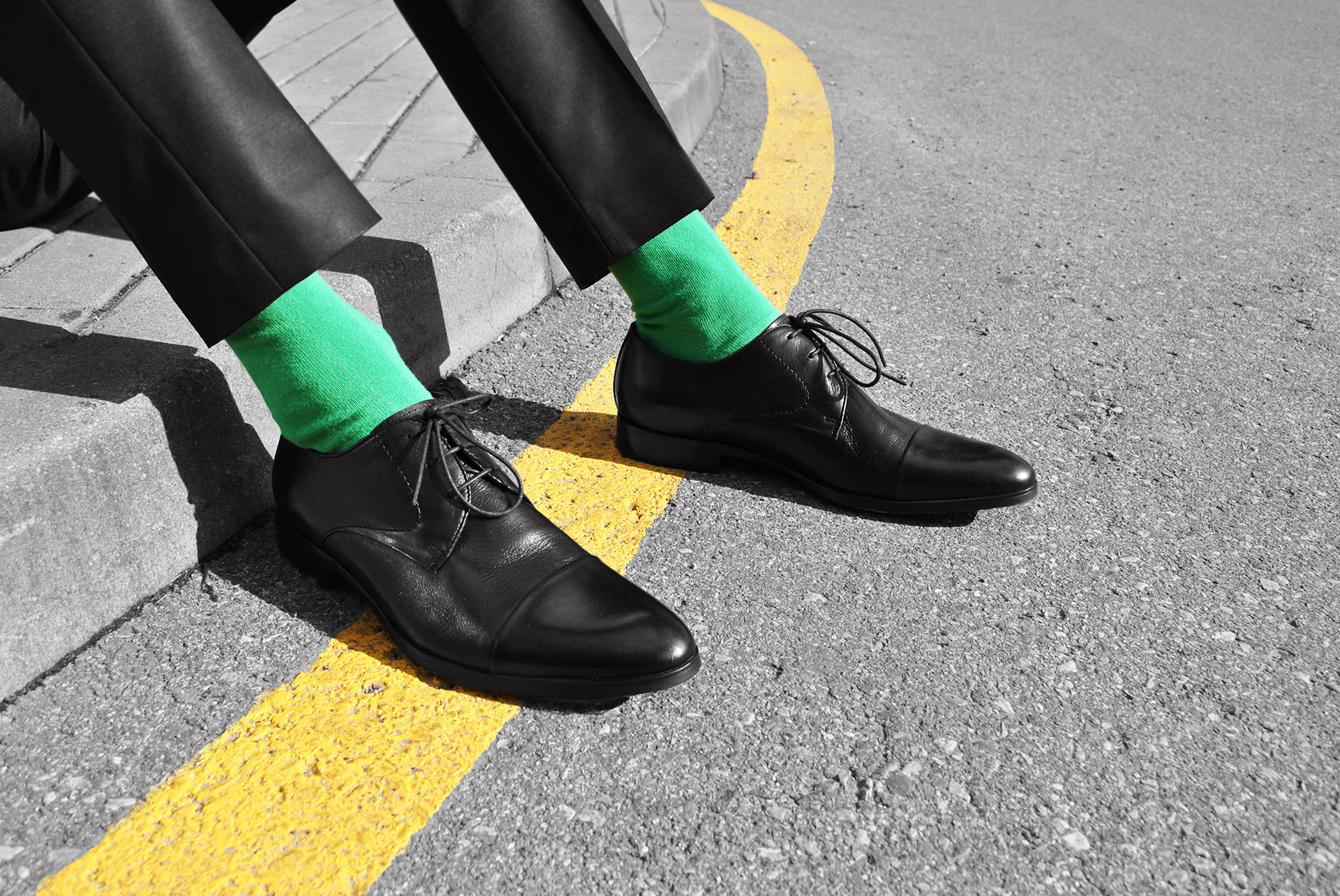 Vyriškos kojinės